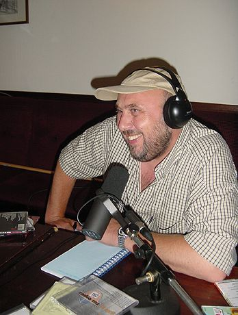 Persfoto Van Dam 2 2003 Peter_van_Dam (dj)